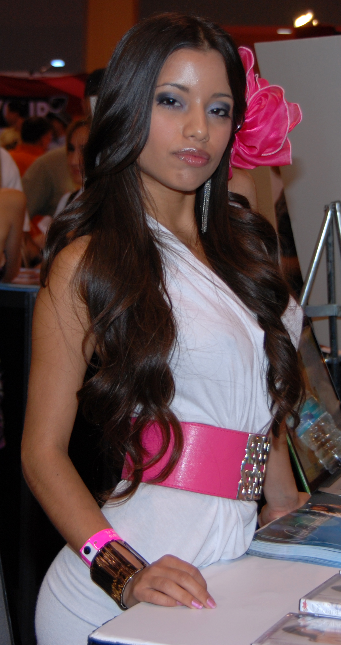 Lupe Fuentes